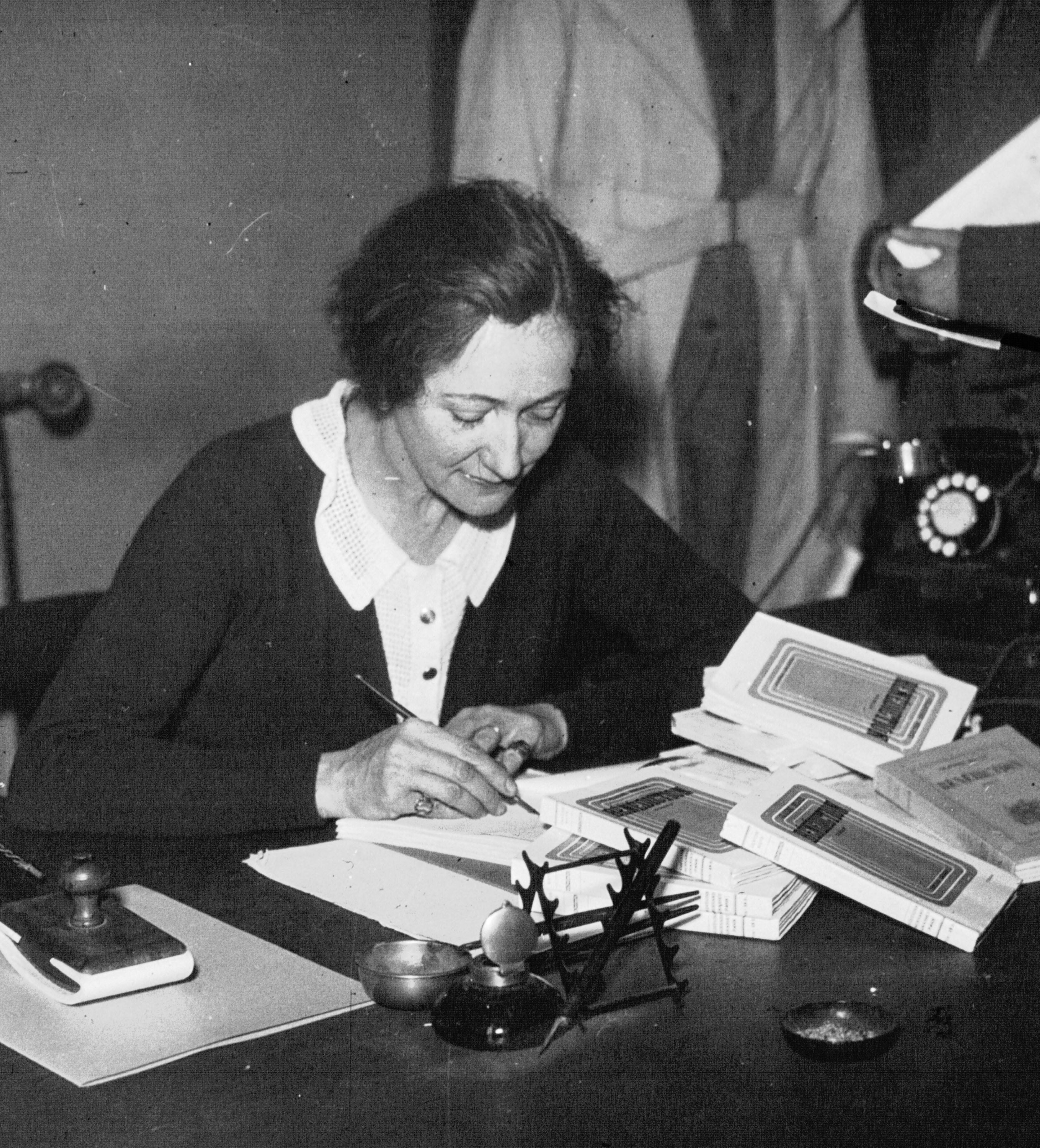 Claude Silve (1887-1978) signant son roman Bénédiction.